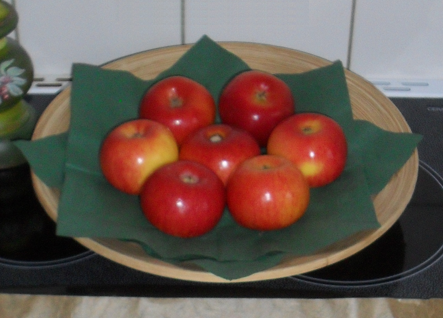 Blank geputzte Äpfel als traditionelle natürliche Weihnachtsdekoration in der Wohnung